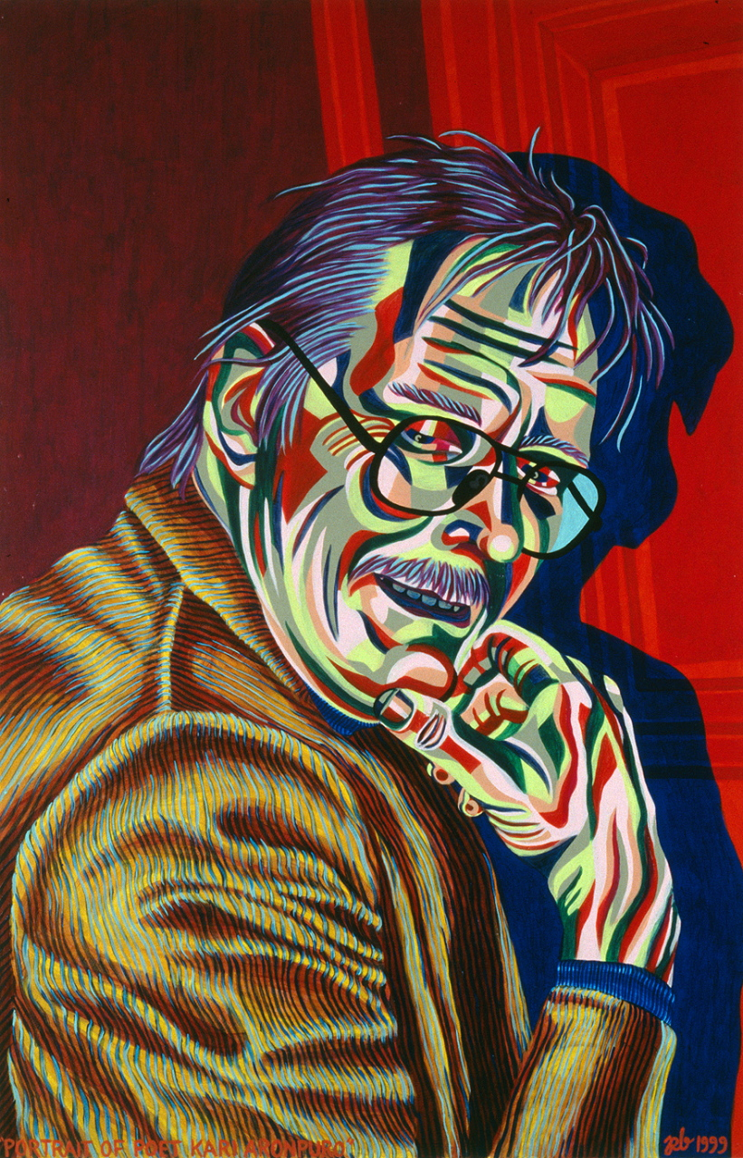 Portrait of Poet Kari Aronpuro, 1999, 90 x 120 cm, akryyli vanerille.